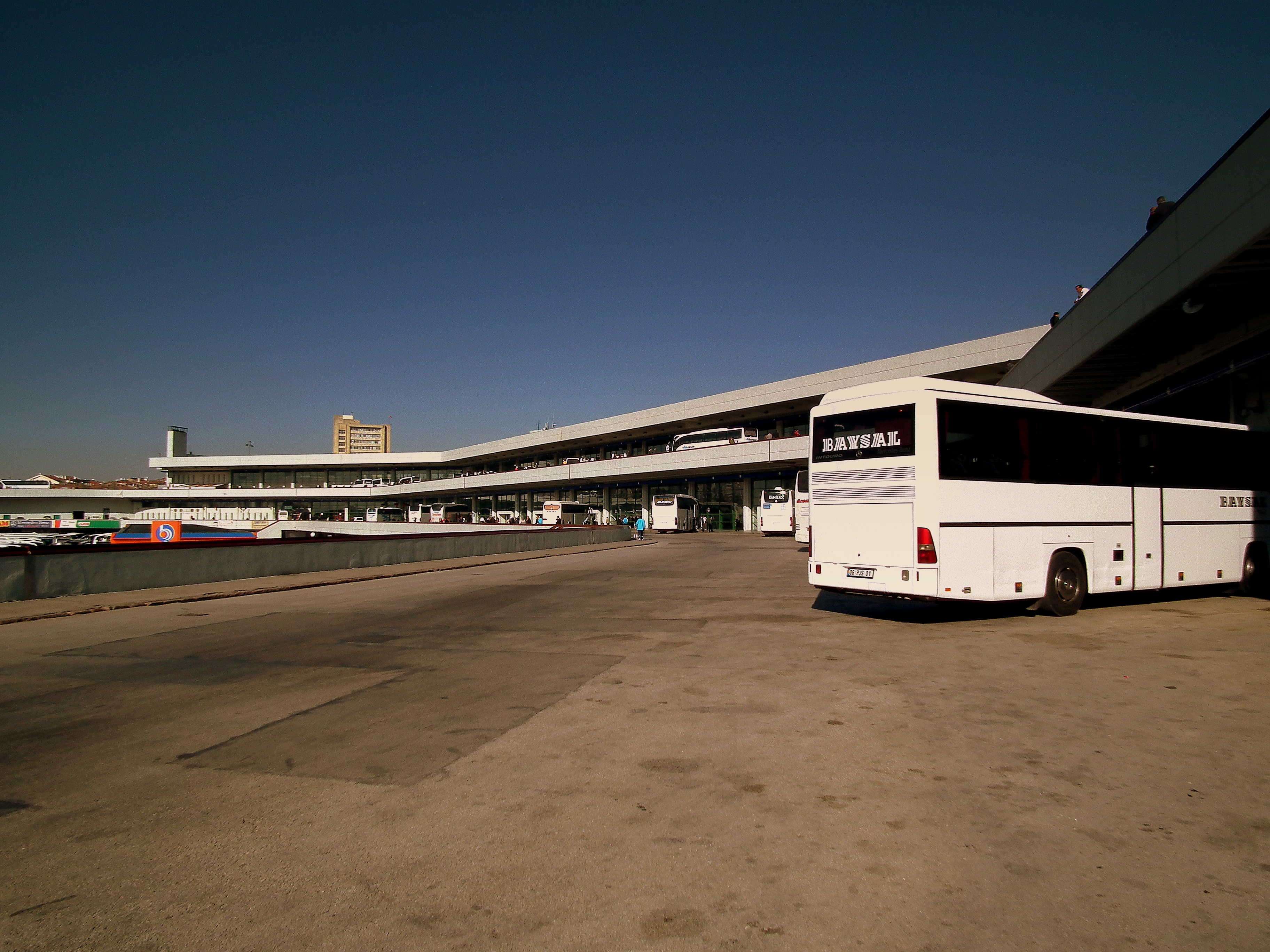 ASTI BUS STATION/OTOGAR ANKARA TURKEY OCT 2011